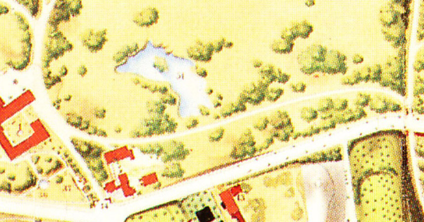 Schlossteich am Drive in Bezug zu Gartenhof und Wirtschaftshof, Ausschnitt aus dem Kraatzplan 1862